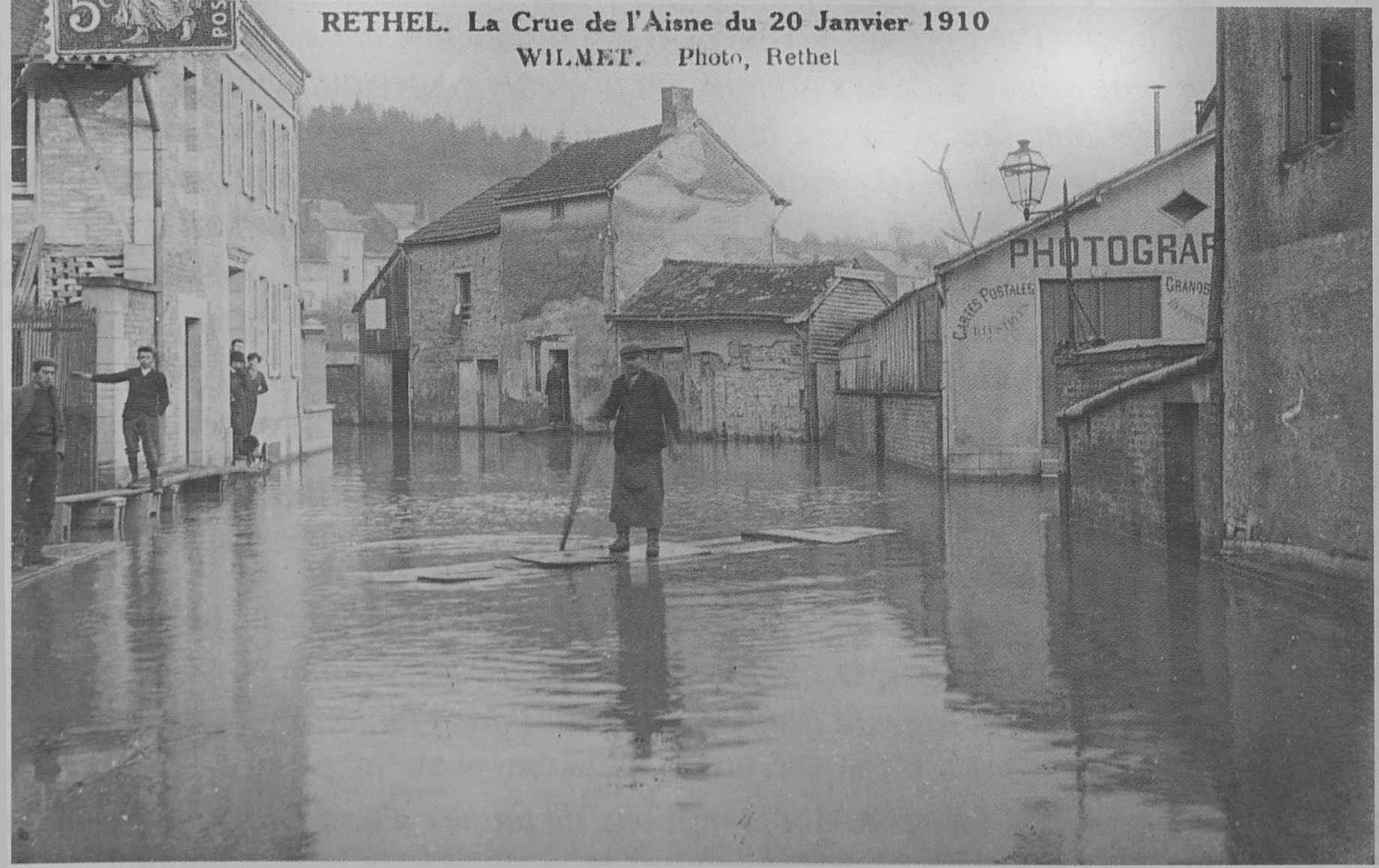 vue de 1910 des inondations.